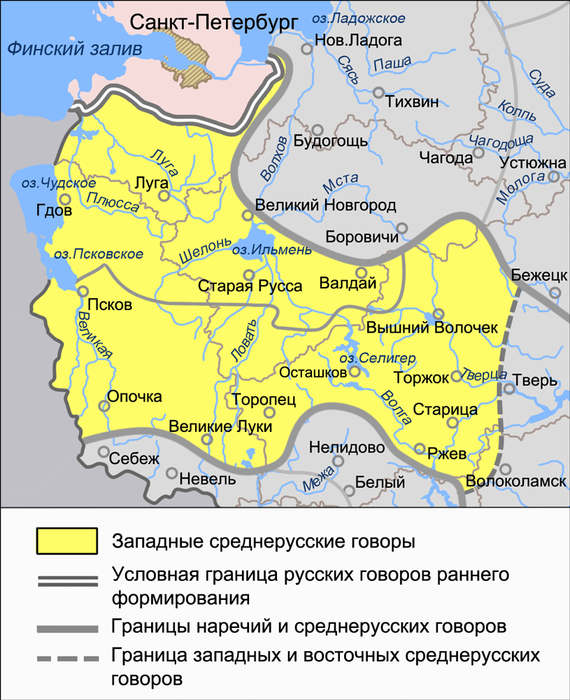 Карта западных среднерусских говоров. Источники: Захарова К. Ф., Орлова В. Г. Диалектное членение русского языка — 2-е изд. — М.: Едиториал УРСС, 2004. — ISBN 5-354-00917-0, с. 141. Касаткин Л. Л. Русские диалекты. Лингвистическая география Русские. Монография Института этнологии и антропологии РАН — М.: Наука, 1999, с. 96. Федеральная целевая программа Русский язык. Региональный центр НИТ ПетрГУ